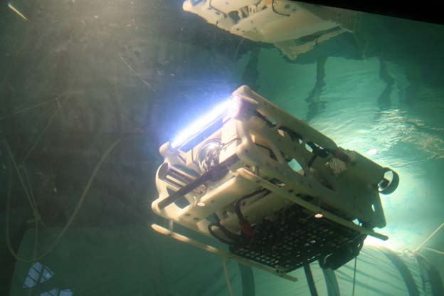 Ein typisches Mini-ROV (ROV EdVard, Hochschule Bremerhaven) mit CTD Sonde und Kamerasystem.